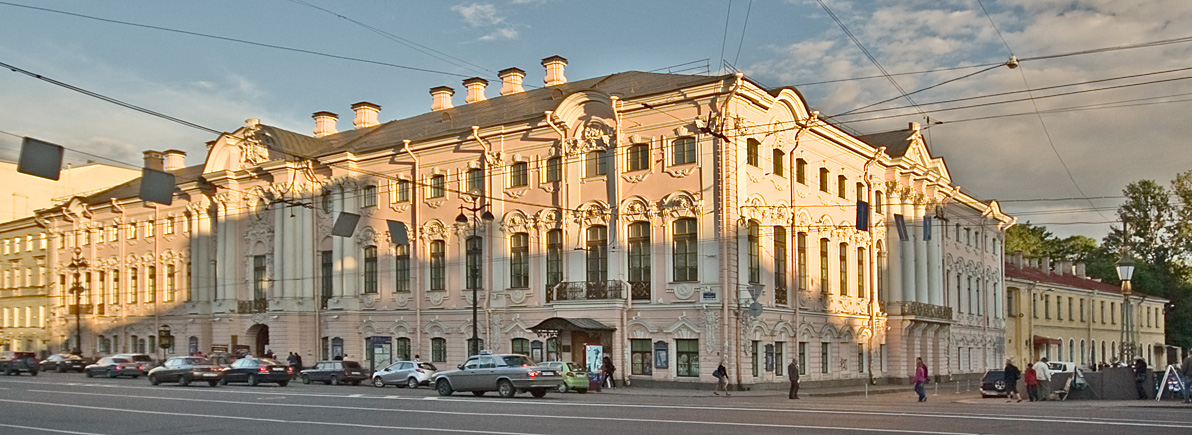 Строгановский дворец, Санкт-Петербург. Вид с Зелёного моста.